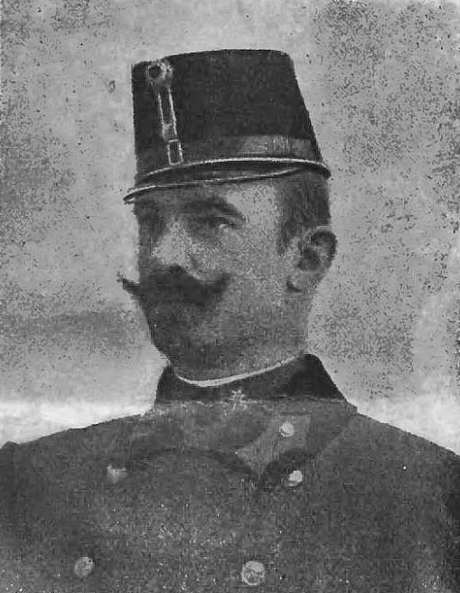 Stanisław Szeptycki (-1905)